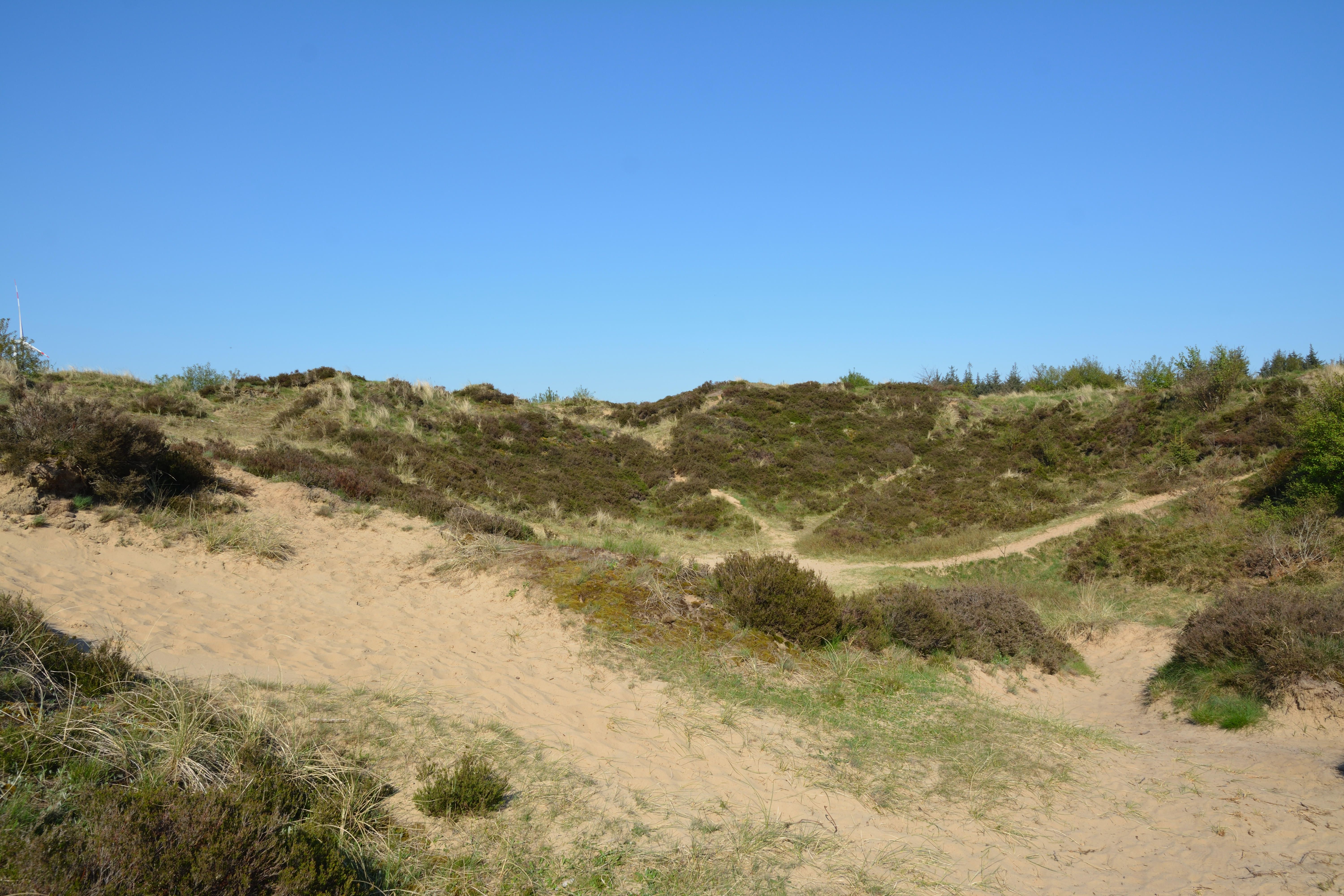 Impressionen aus dem Naturschutzgebiet "Süderlügumer Binnendünen" in Süderlügum